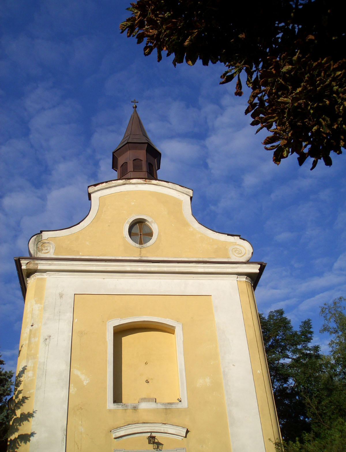 Kalvarienbergkriche in Wels